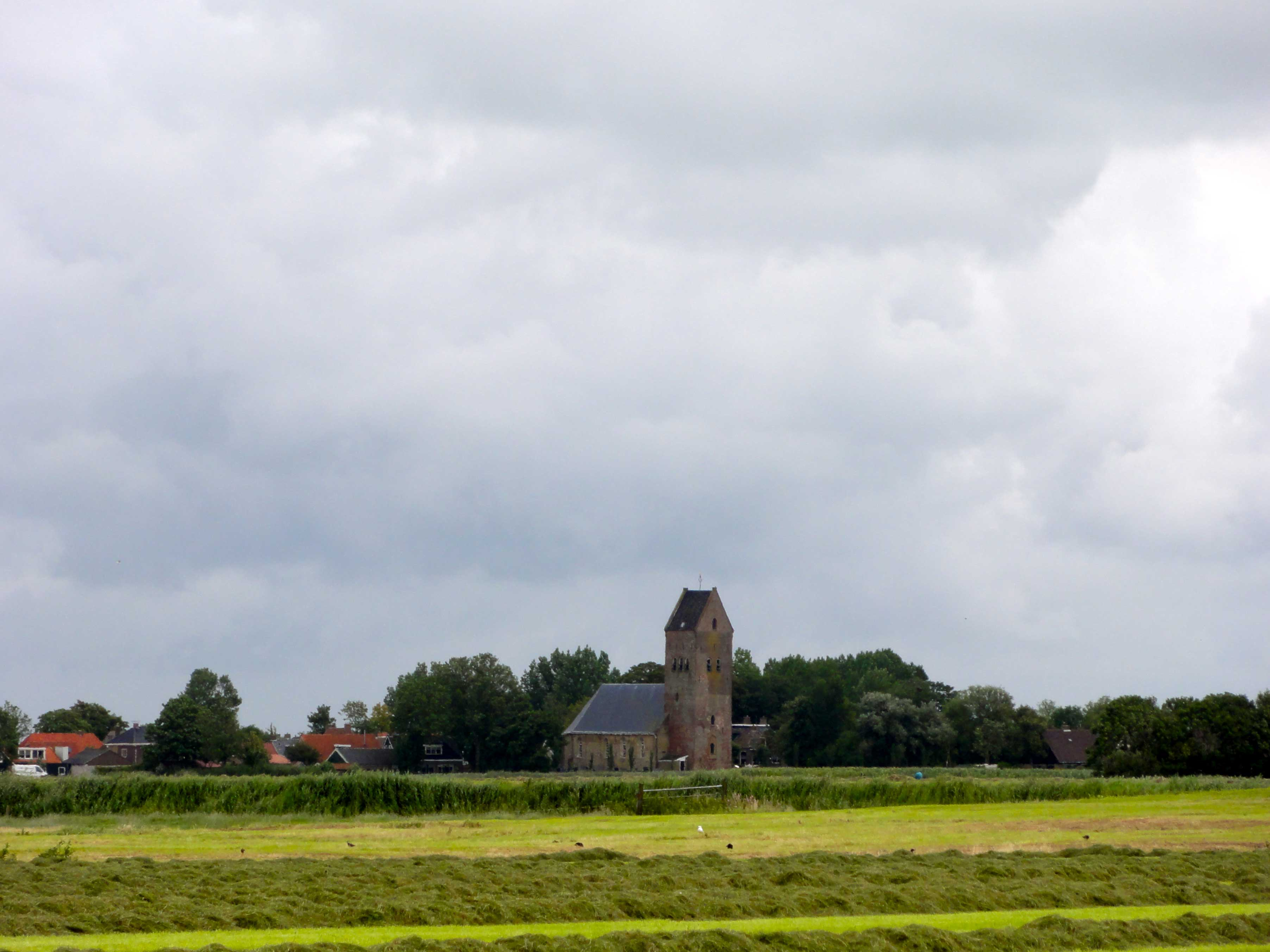 Zicht op Parrega met de Sint-Johannes de Doperkerk